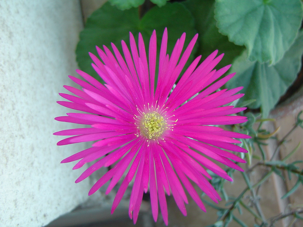 Uña de gato (Lampranthus coccineus), España.